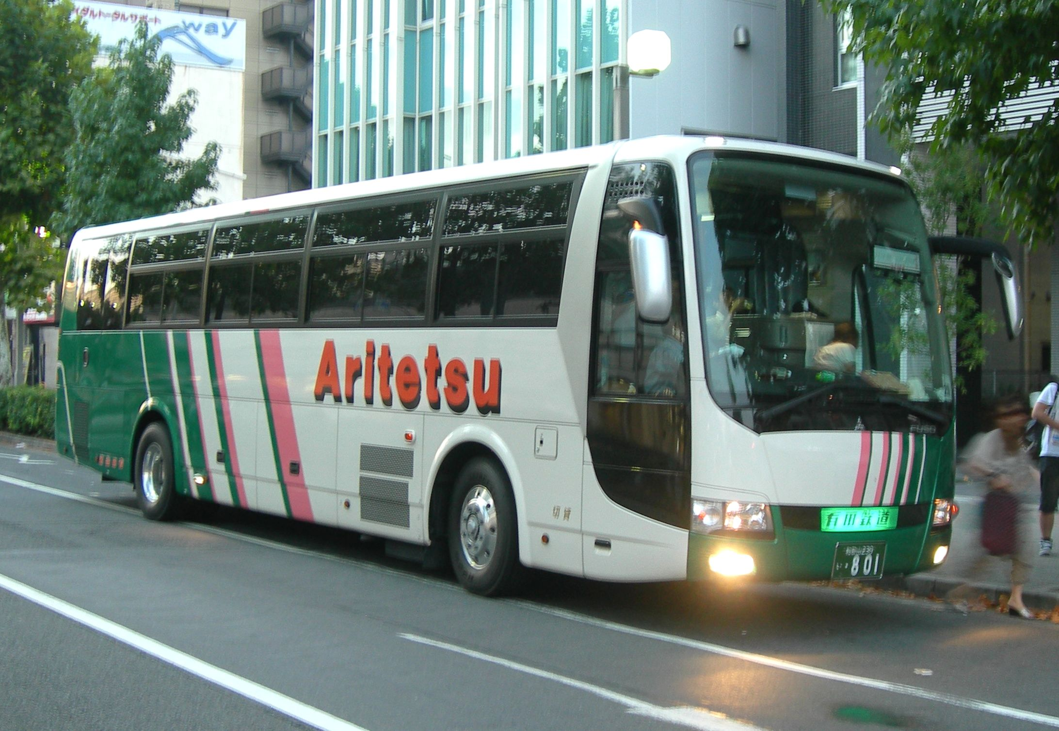 有田鉄道バス